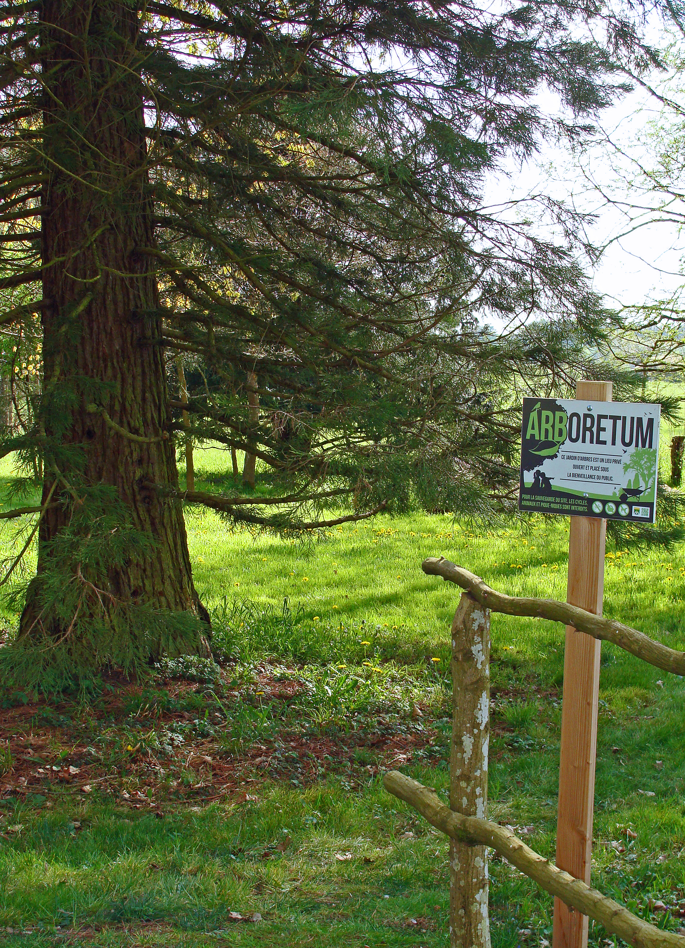 Arboretum de Hoste-Bas, commune de Hoste (Moselle). On peut remarquer à droite un sequoia